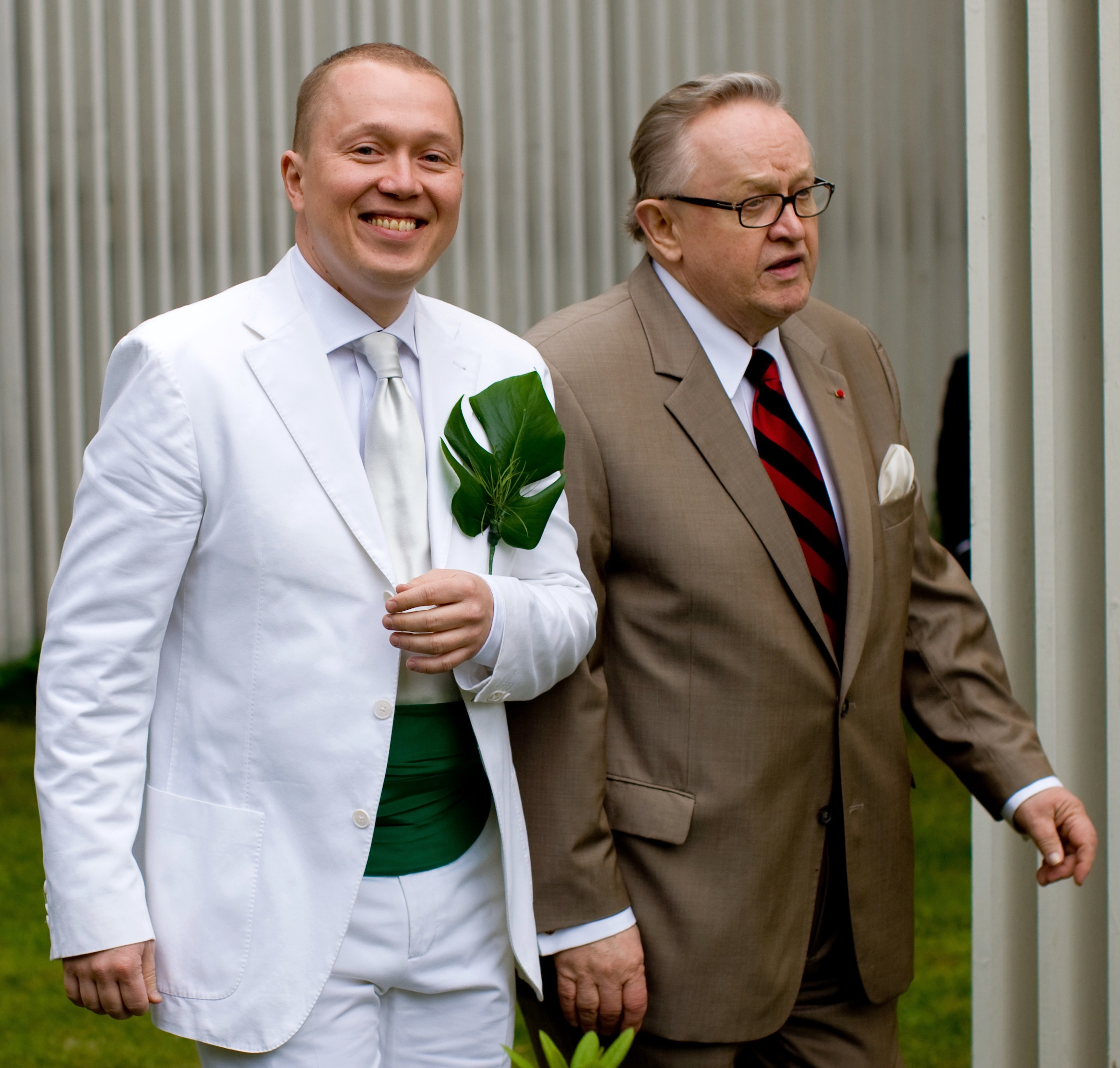 Marko and Martti Ahtisaari - like father like son